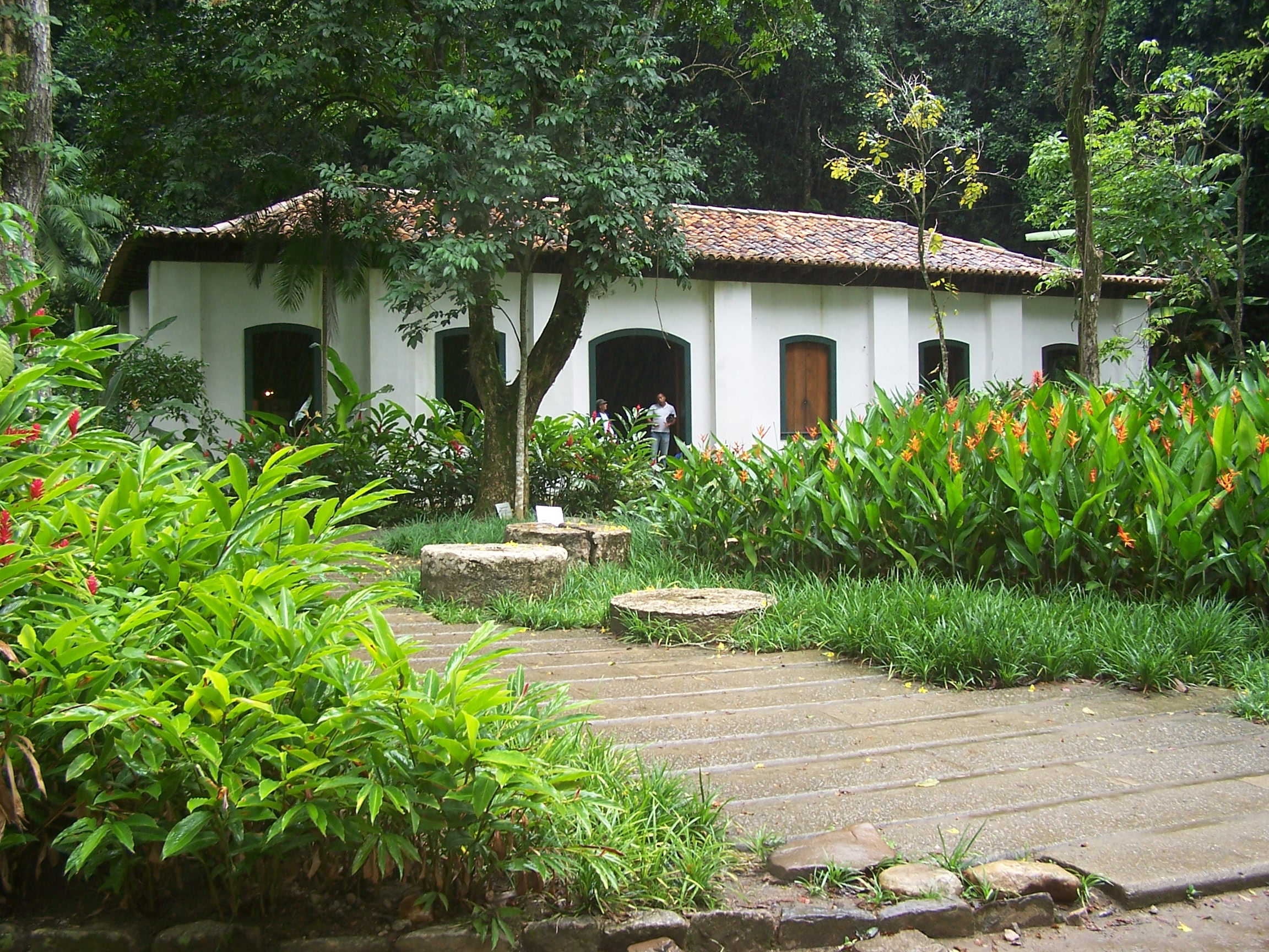 “Casa dos Pilões” in the Botanical Gardens of Rio de Janeiro